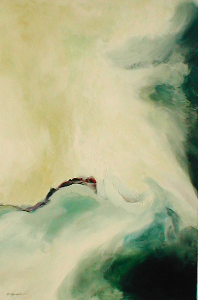 Sturm am Meer 1999